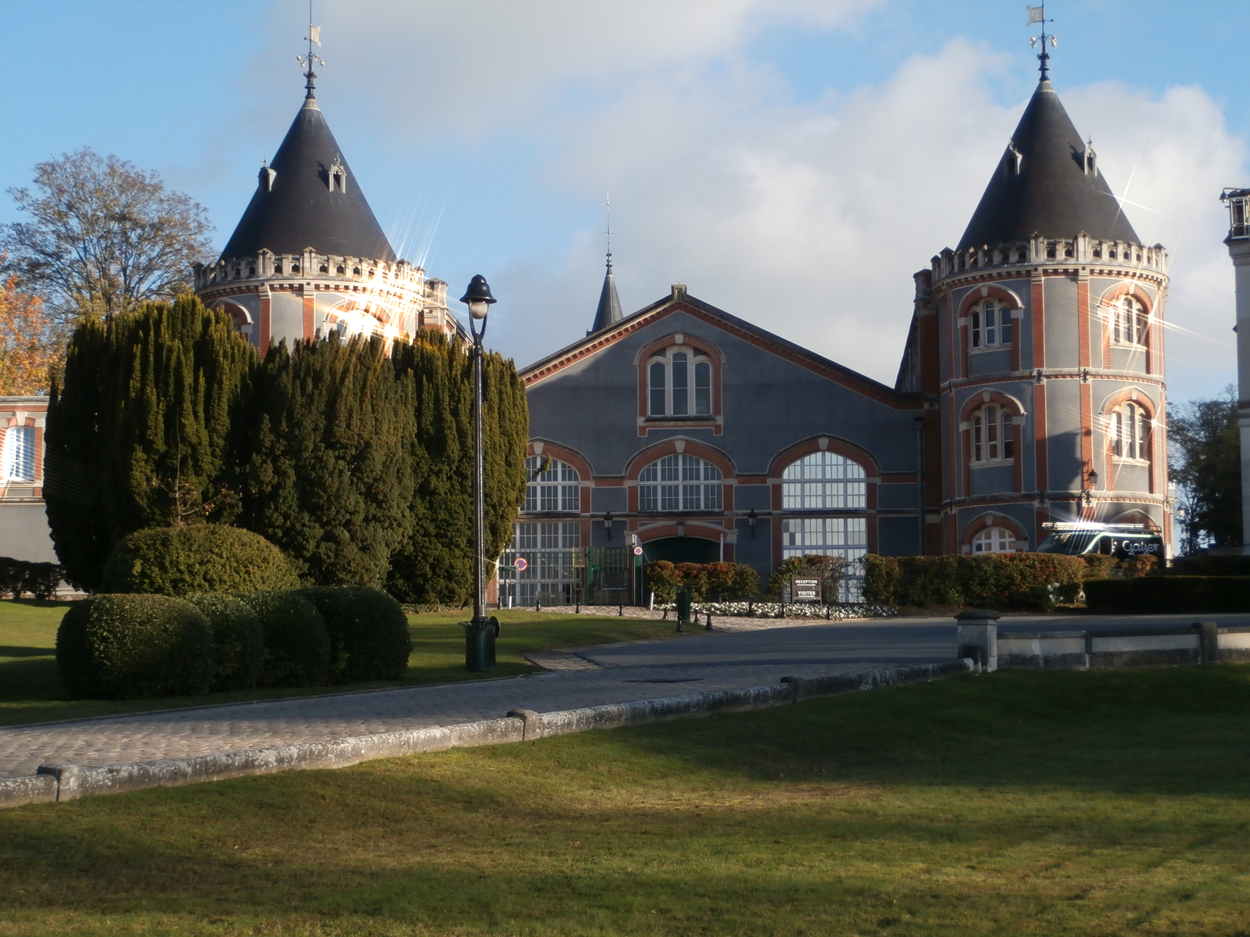 Domaine Pommery : Château de style élizabéthain Reims, 5 place du Général Gouraud Années de construction : de 1868 à 1878 Initiatrice du projet : Jeanne-Alexandrine Louise Pommery